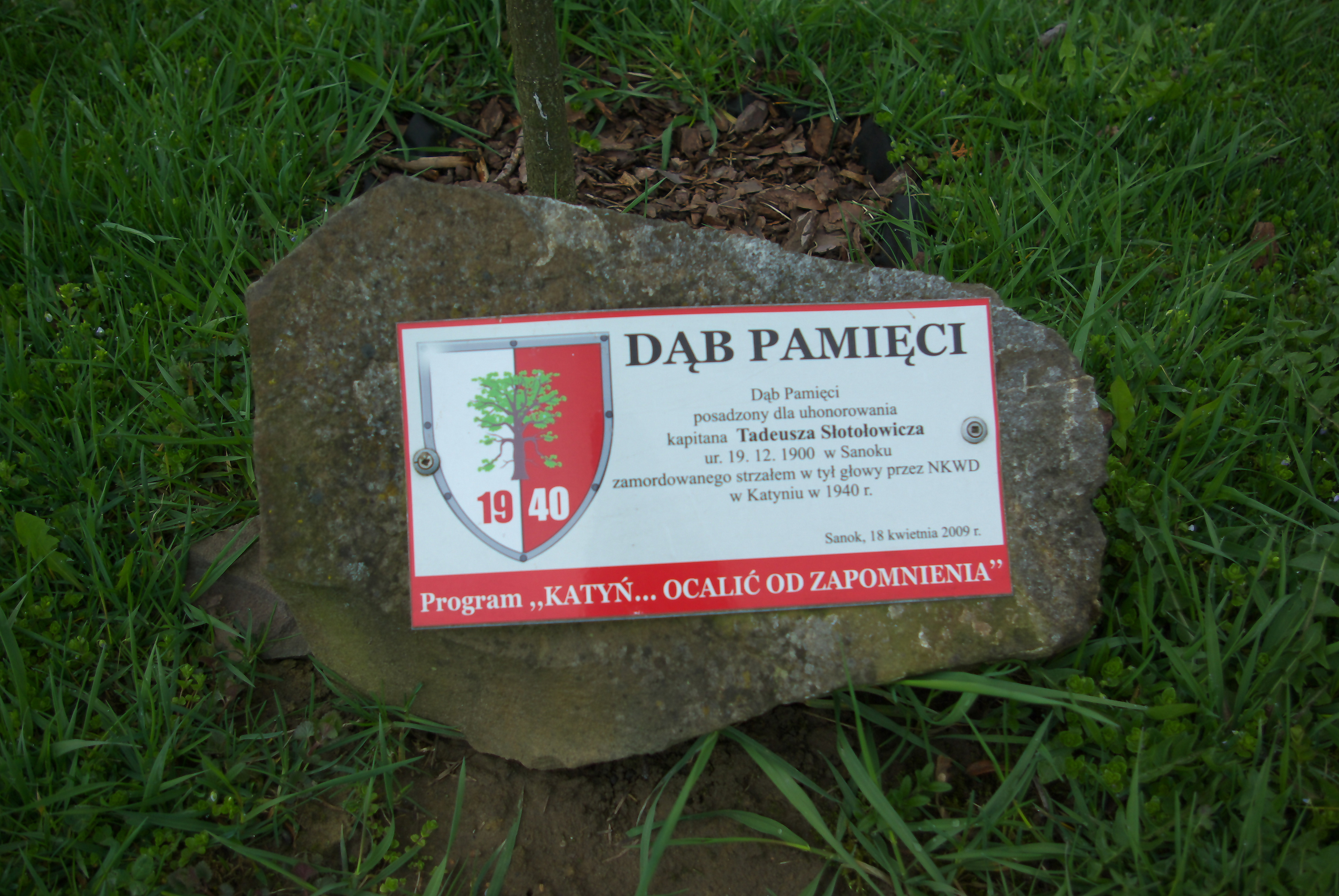 Kamień pamiątkowy przy Dębie Pamięci honorującym Tadeusza Słotołowicza na Cmentarzu Centralnym w Sanoku